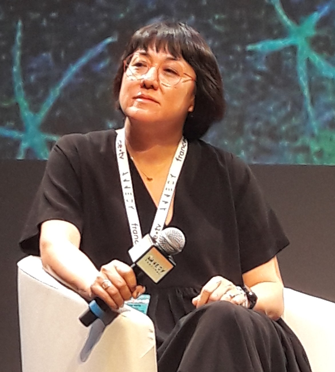 Ramsey Naito au festival international d'animation d'Annecy 2019.